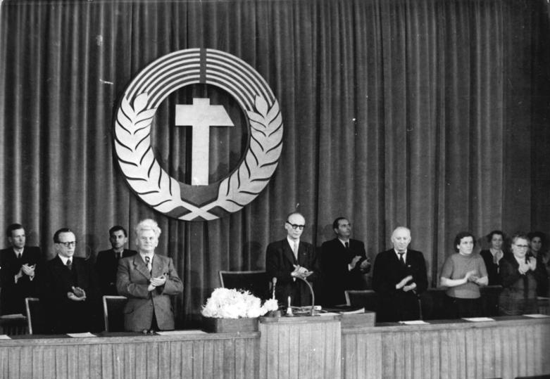 Zentralbild Sturm 8.11.1950 1. Sitzung der Volkskammer. Am 8.11.1950 fand im Haus der Volkskammer in Berlin die 1. Vollsitzung der neugewählten Volkskammer statt. UBz: Nach der Wahl des neuen Präsidenten der Volkskammer. 1. Reihe v.l.n.r.: Vincenz Müller (NDPD), Hermann Matern (SED). Präsident Johannes Dieckmann und Minister Goldenbaum.